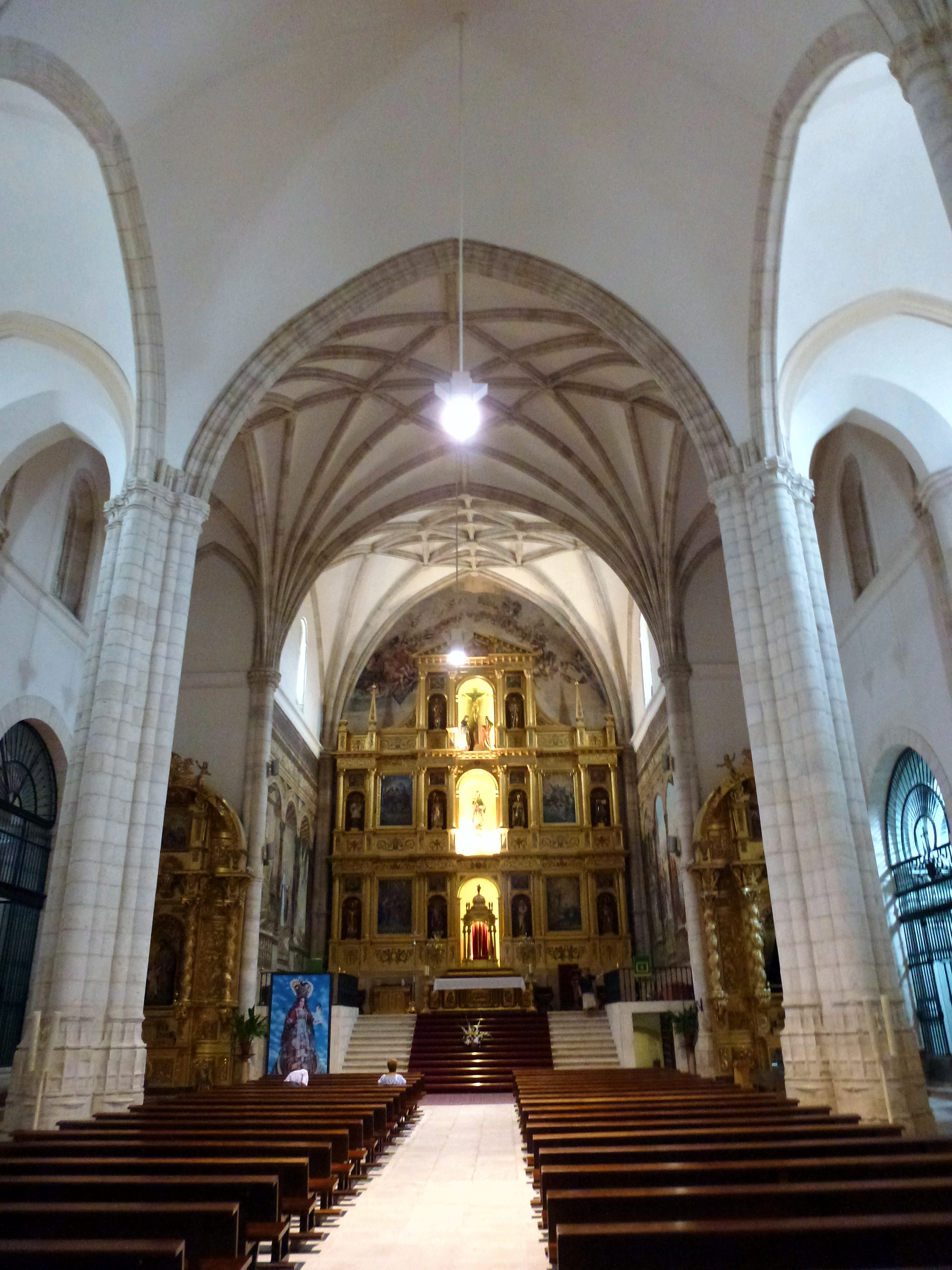 Interior de la Iglesia de Santa María la Mayor (Colmenar de Oreja)